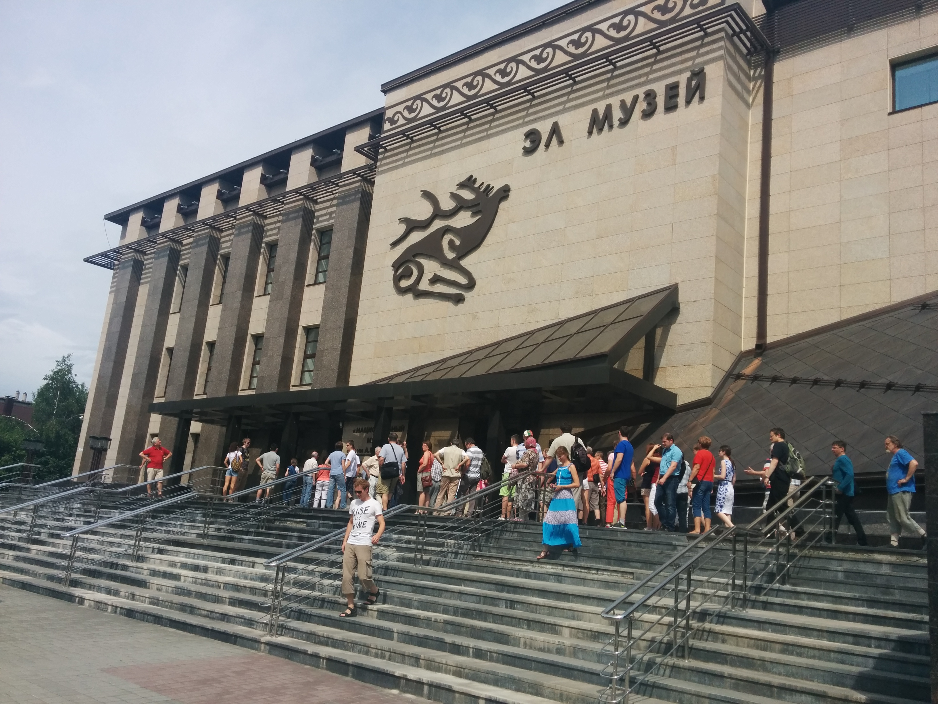 Тыва дыл: Алдай Республиканың Чоннуң музейи